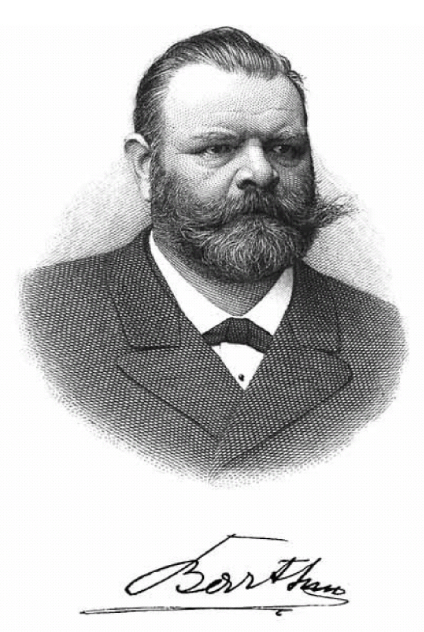 Ludwig Barth zu Barthenau (* 17. Januar 1839 in Rovereto; † 3. August 1890 in Wien)